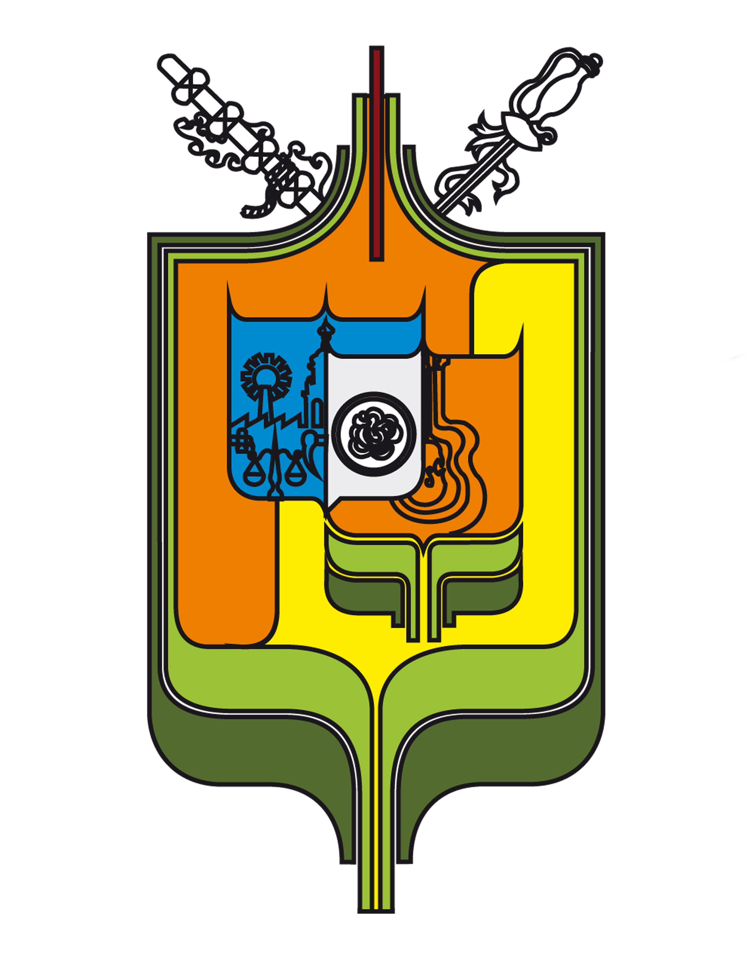 Escudo de Armas de Cocula Jalisco